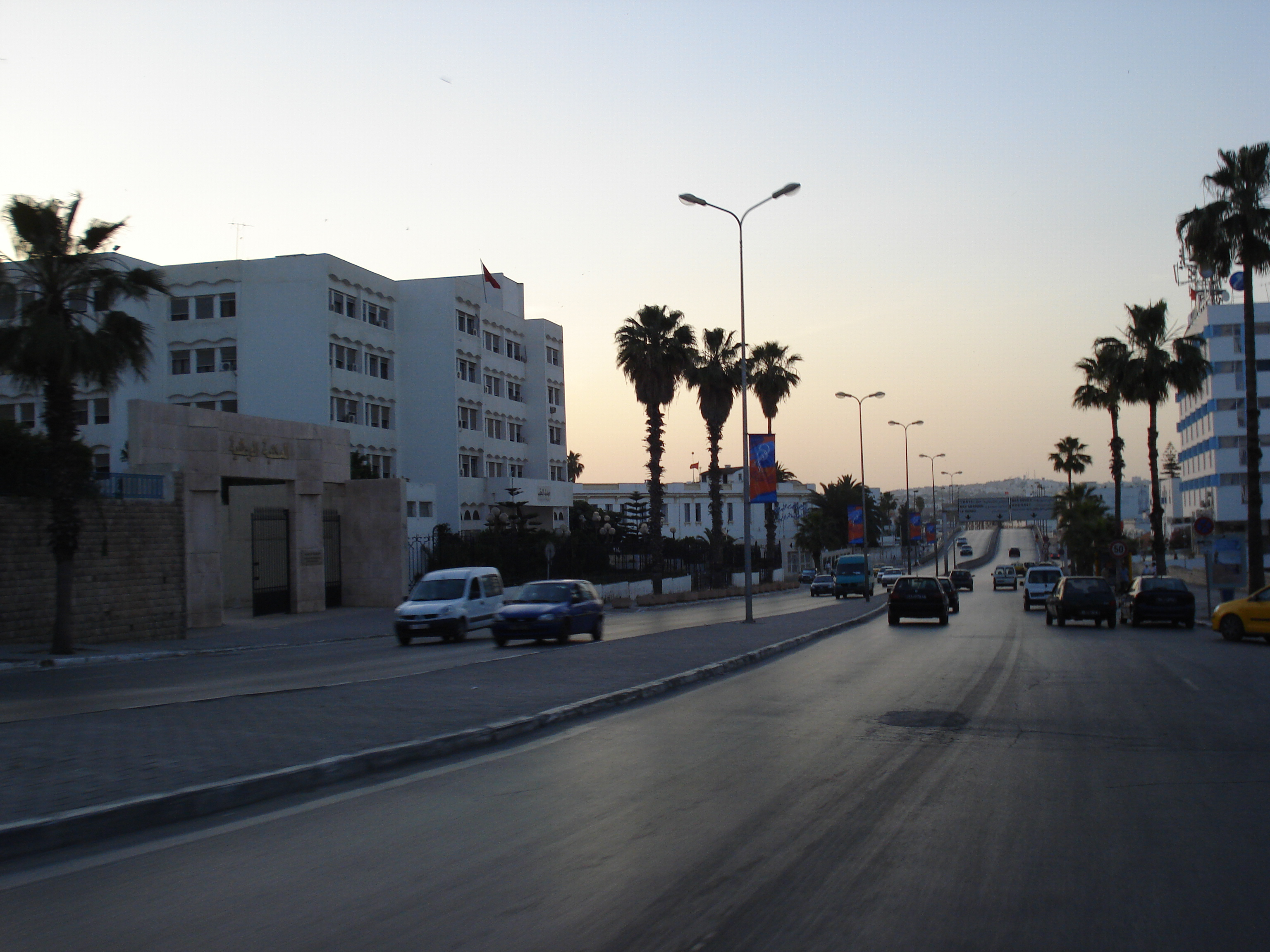 Avenue 9 avril 1938, Tunis, Tunisie